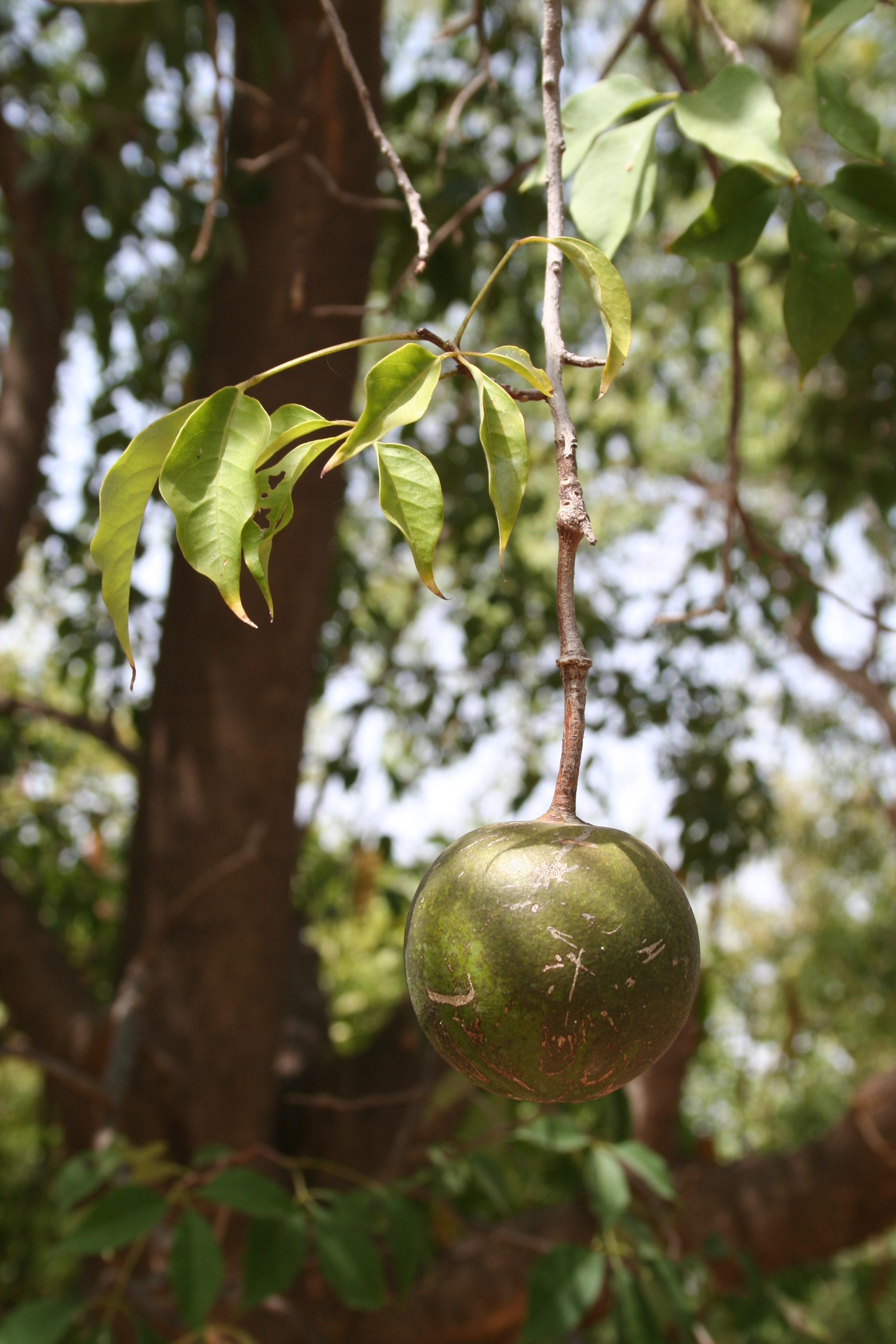 Crateva adansonii, Forêt Classée de Gonsé, Burkina Faso